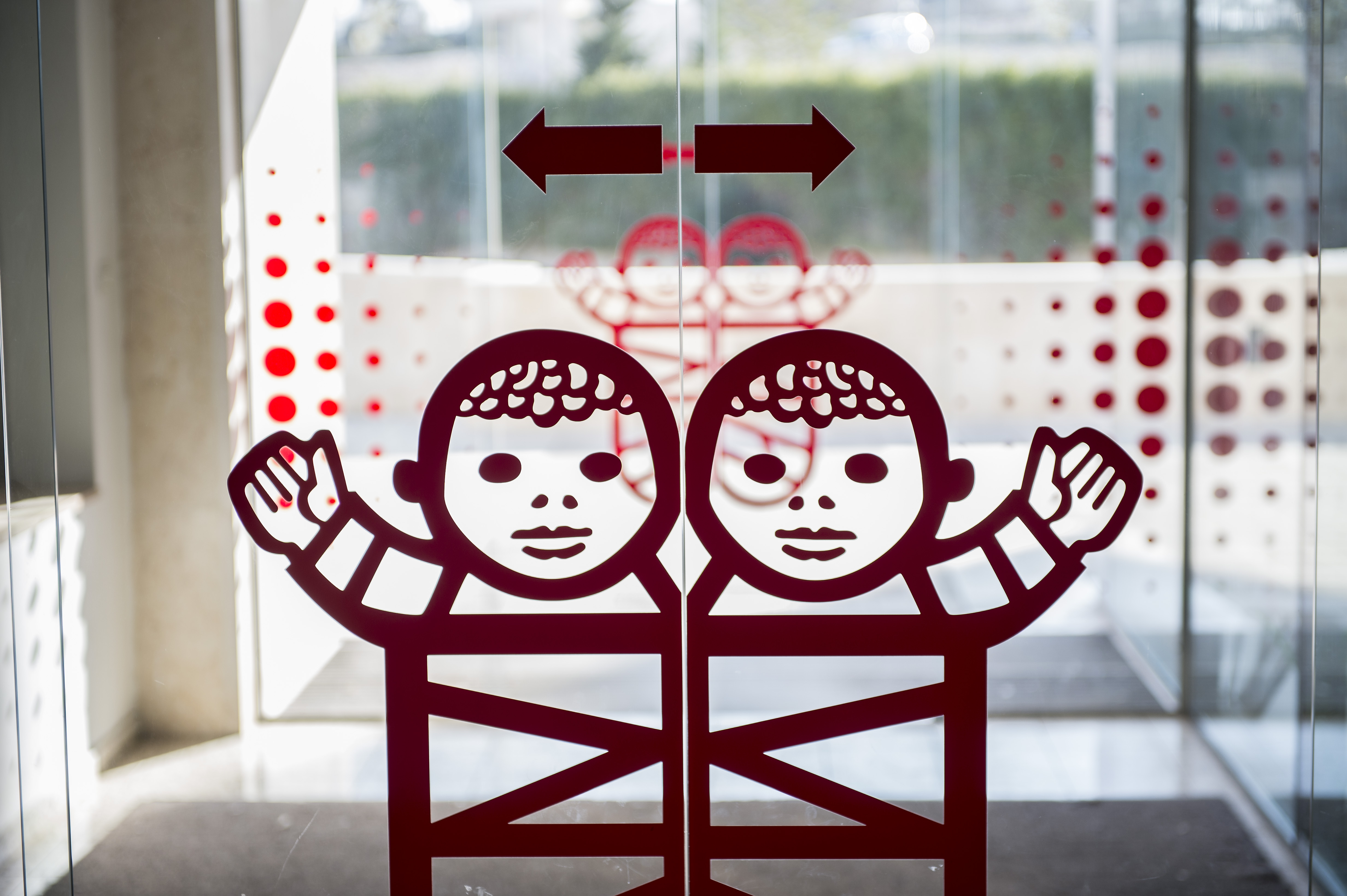 Eingang Out-Patient Clinic des Kinderspitals